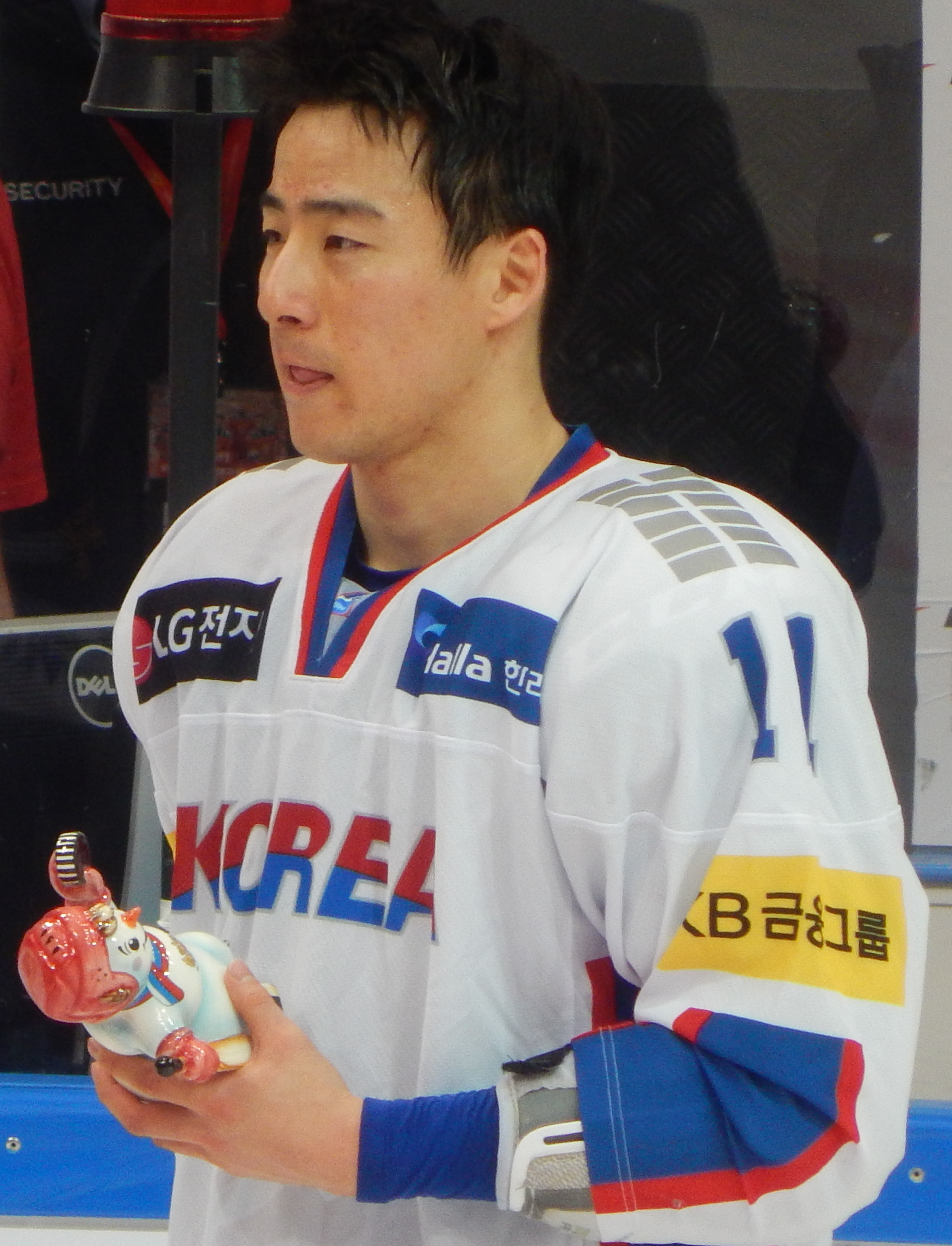 Кубок Первого Канала 2017, матч Финляндия - Южная Корея (15 декабря 2017) 11 KIM,Ki Sung